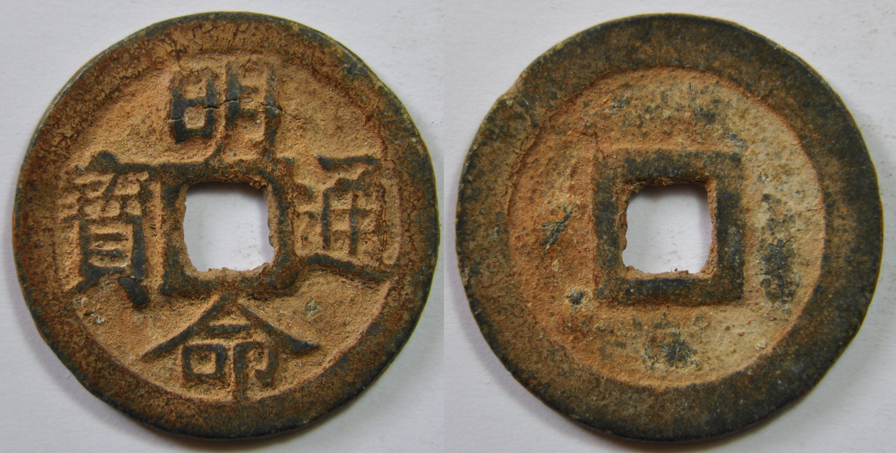 Une sapèque en zinc de l'empereur Nguyen Phuc Giao (1819-1840), ère Minh Mang (1820-1840). A/ Minh Mang thong bao (Monnaie courante de Minh Mang) R/ Vide Dimension : 23,5 mm Poids : 2,6 g. Les monnaies de zinc sont fabriquées à un poids de 6 phan (2,2-2,3 g.). Une sapèque de laiton de 6 phan vaut 3 sapèques de zinc. Cette monnaie pèse 7 phan. Référence : C79 Remarque : Belle couleur peu courante.